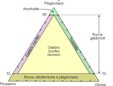 Diagramma classificativo IUGS per rocce mafiche a plagioclasio, olivina e pirosseno in base al contenuto percentuale in volume dei tre minerali (moda)